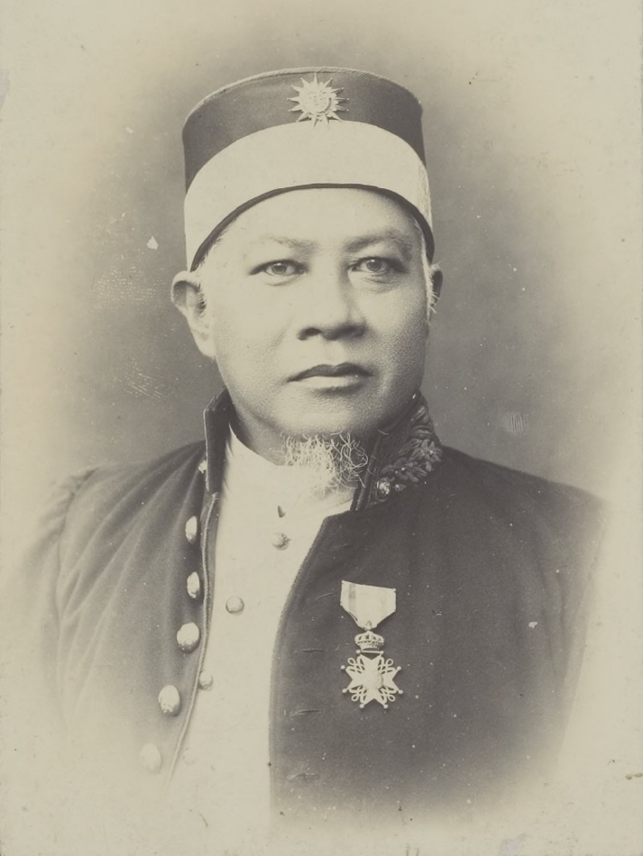 Mohammad Sjafioedin, sultan van Sambas